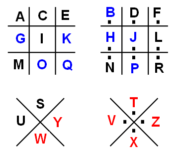 Clé probable du code « parc à cochon » du Musée de la Franc-maçonnerie